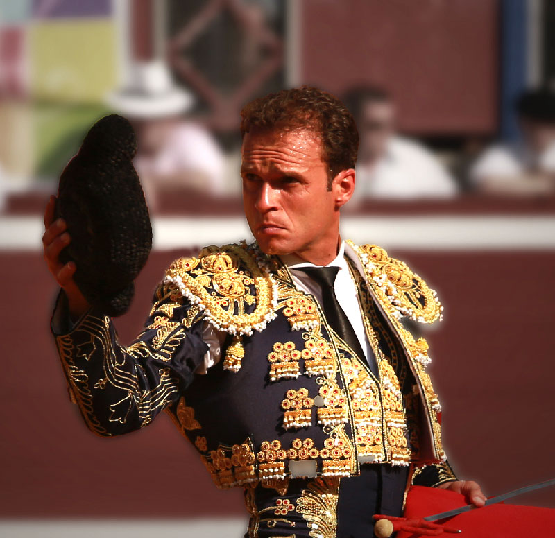 Antonio Ferrera (José Antonio Ferrera San Marcos) torero español de Villafranco del Guadiana.